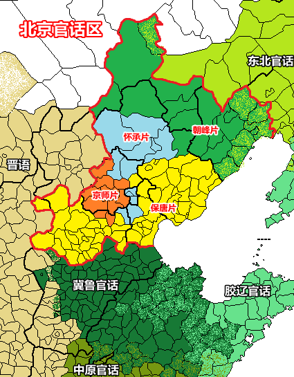 汉语官话方言中北京官话的分布范围地图。